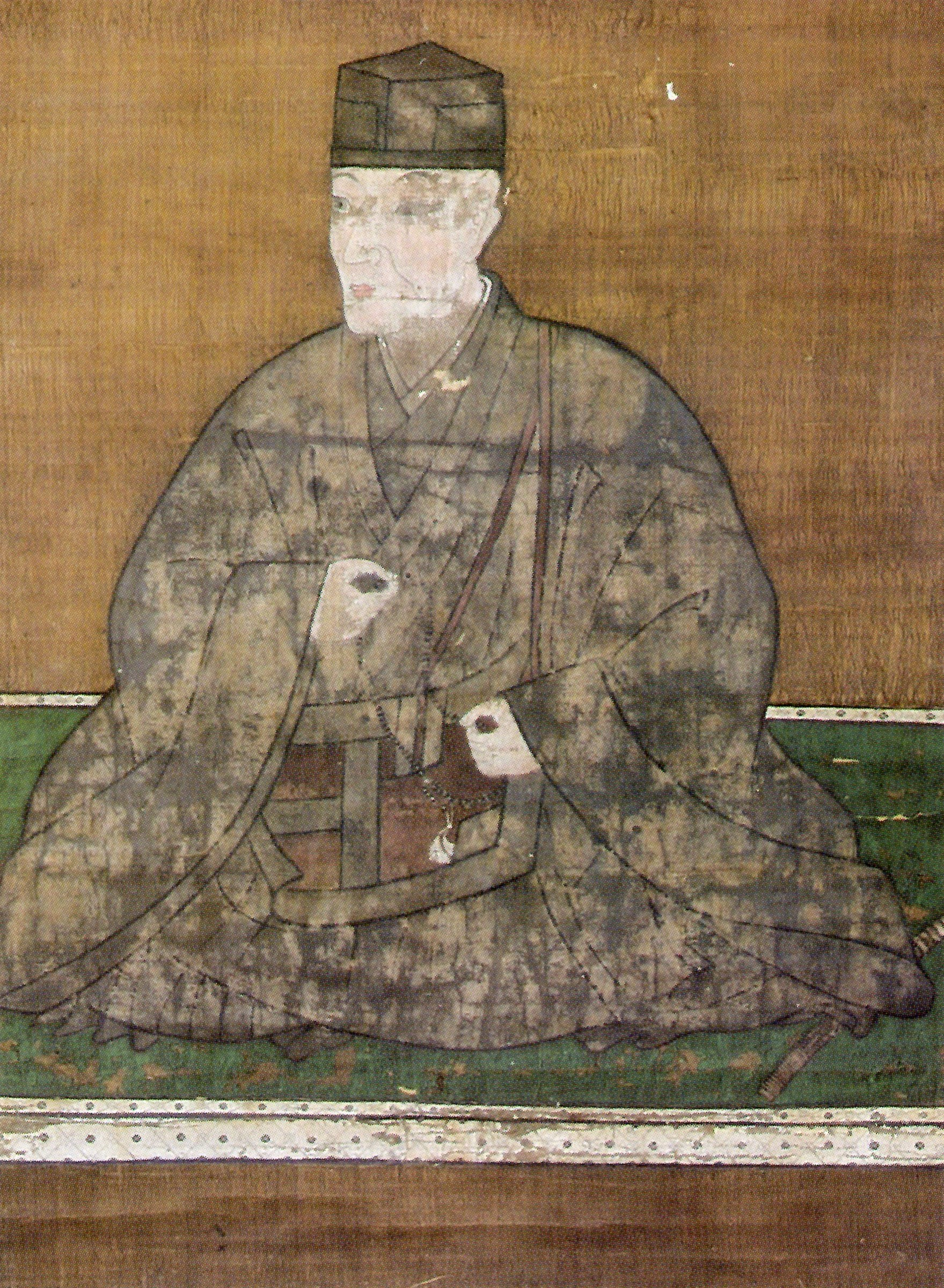 蒲生定秀の肖像。